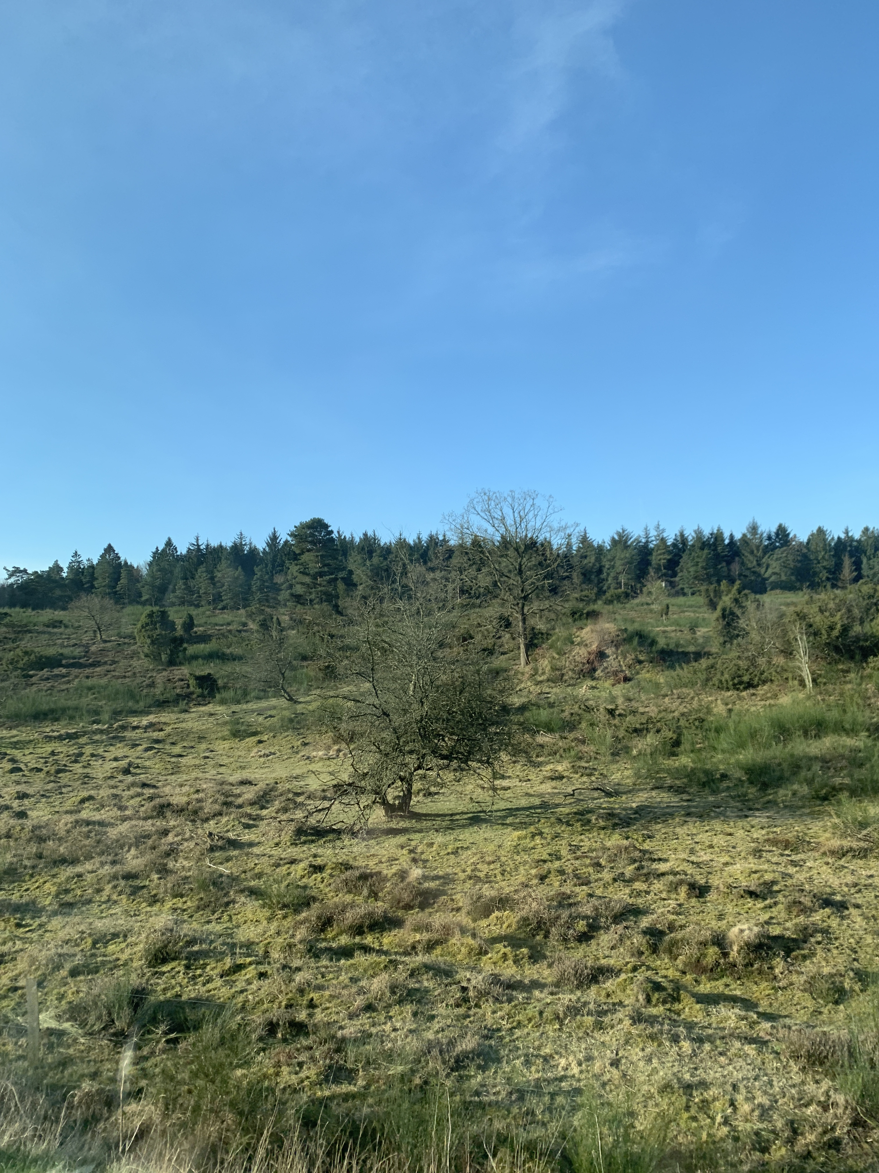 Marienhøj Hede ved Hadsund